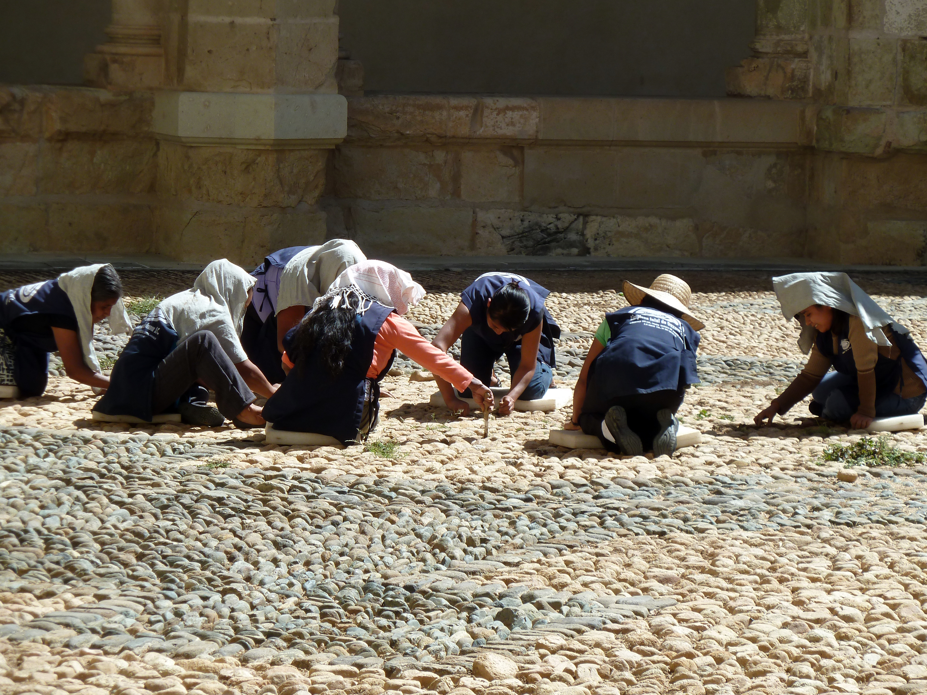 Day 5: Oaxaca